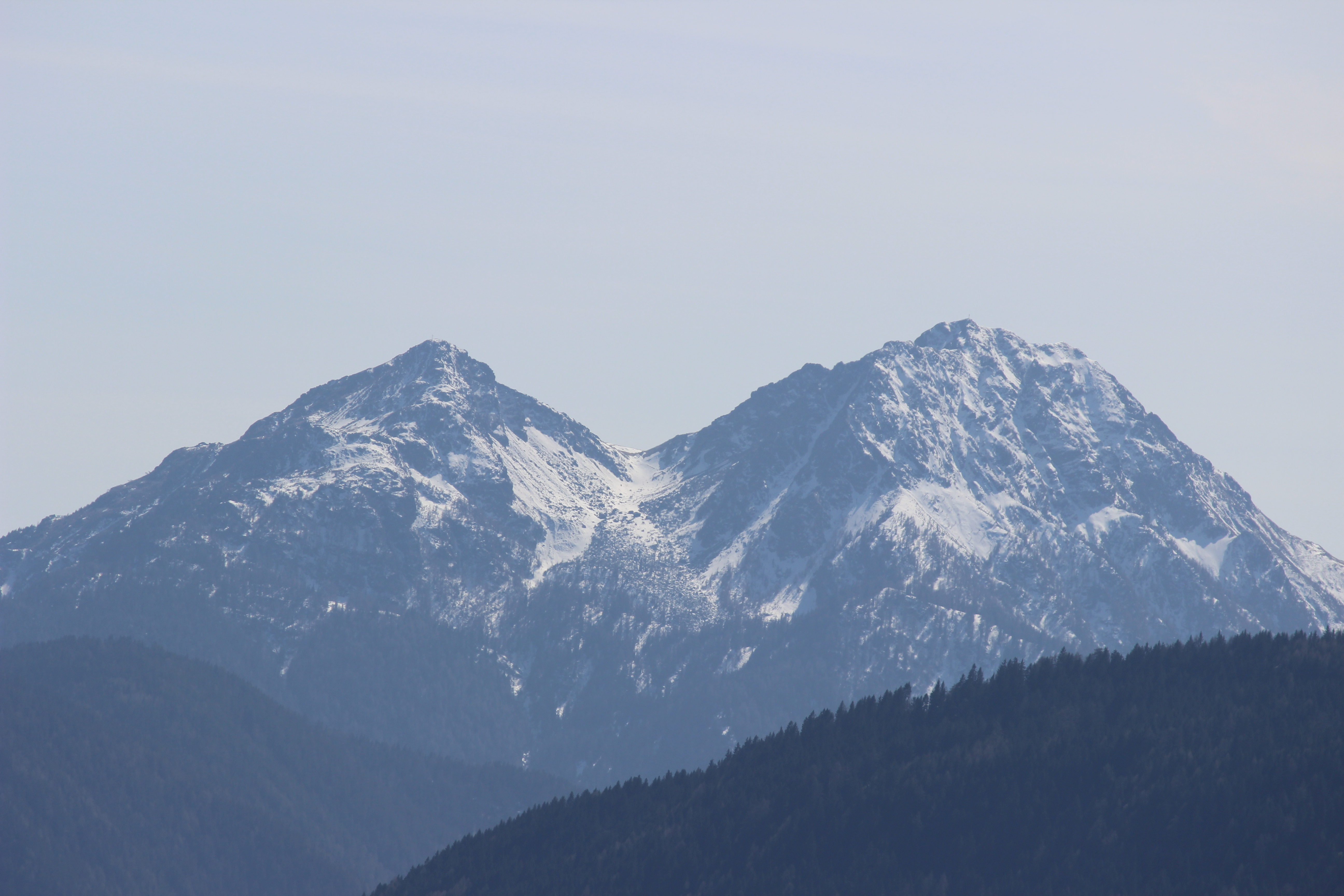 Die Laugenspitze von Nordwest